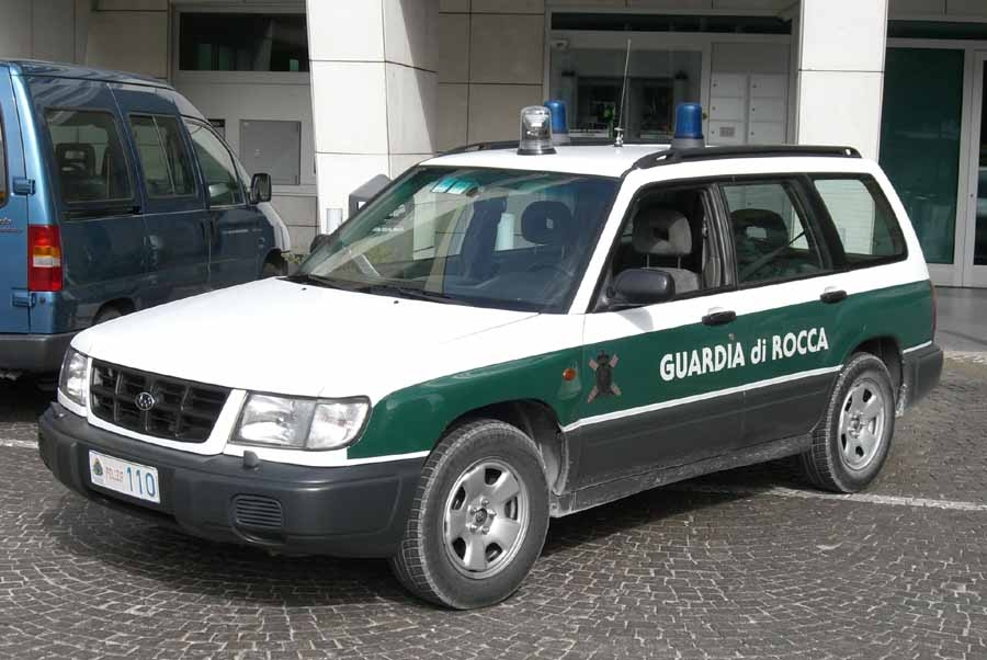 Subaru Guardia di Rocca